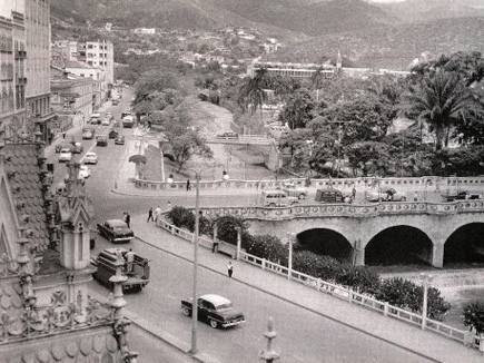 Vista del puente ortiz